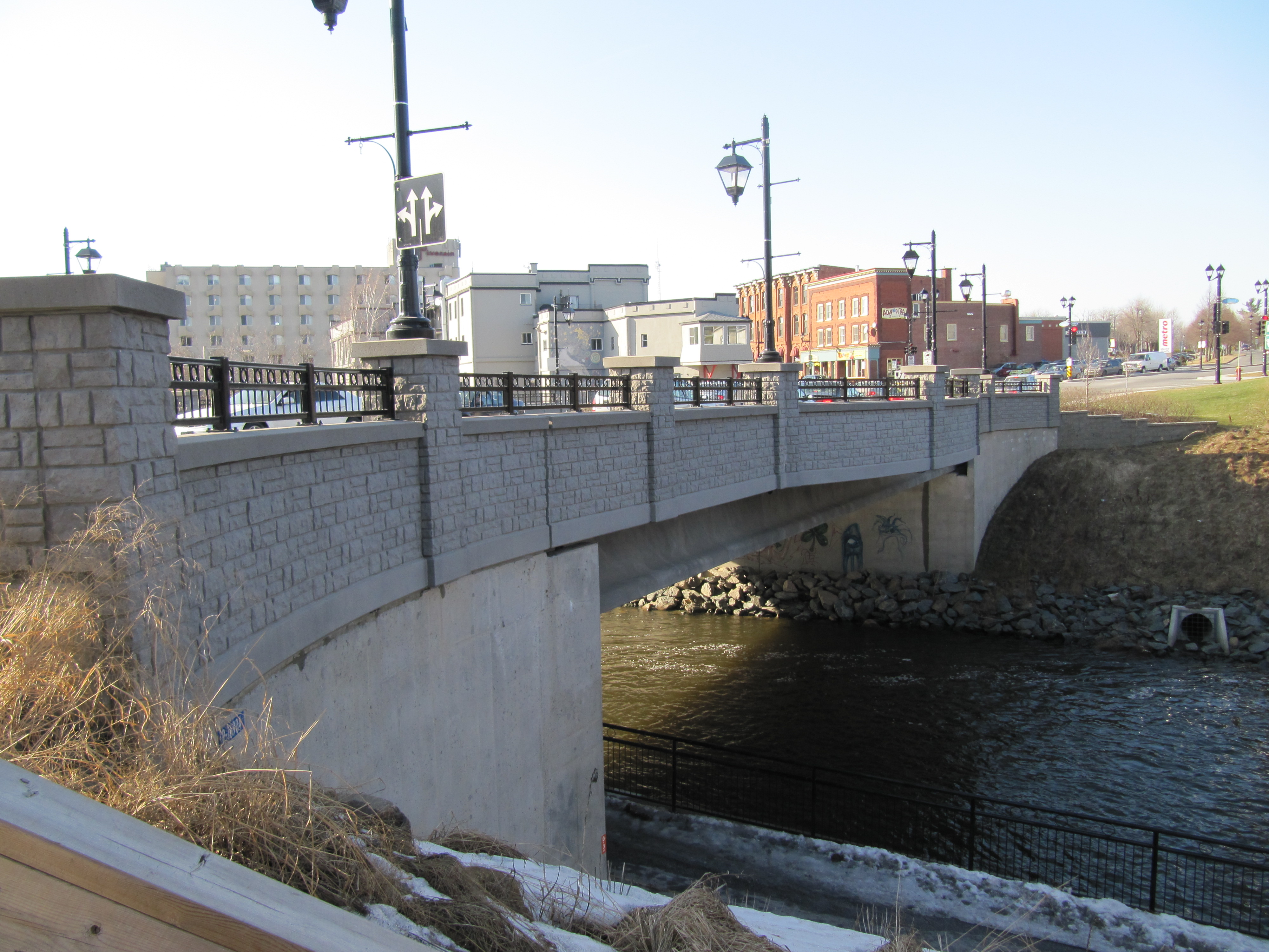 Pont Patrick-Hackett à Granby (Québec). Construit en 2009 et dénommé le 4 mai 2009.